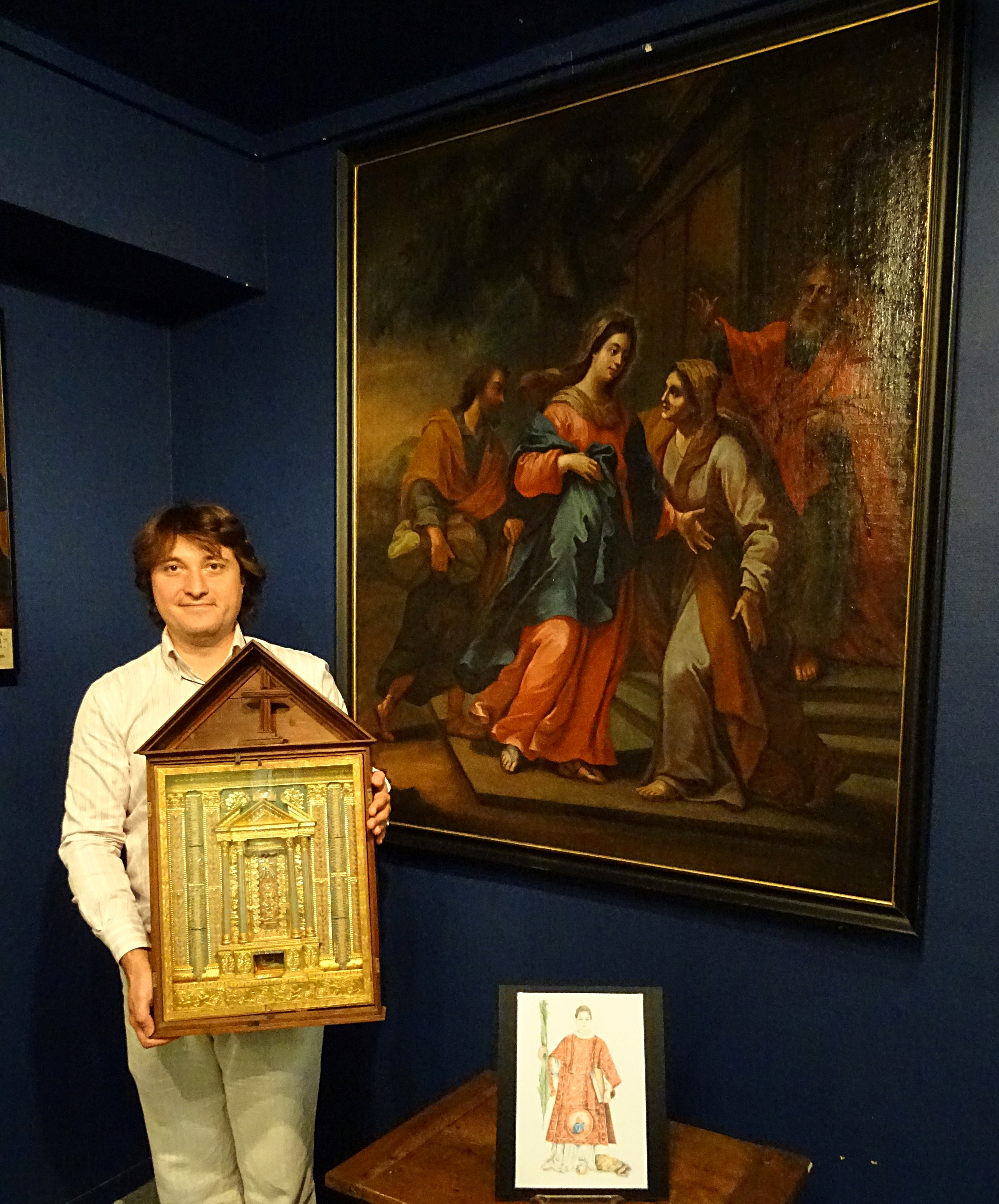 Musée Européen de la Visitation, Moulins (Francia), il conservatore del museo, dott. Jean Foisselon, accanto al reliquiario-calendario di San Cesario diacono e martire, e all'icona "Caesarius Diaconus".